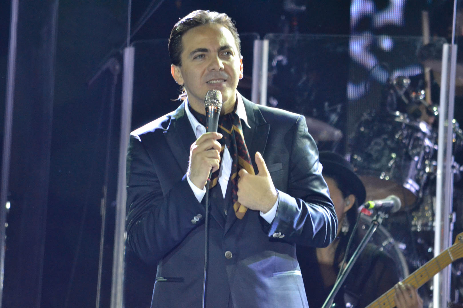 Concierto de Cristian Castro en Cavancha - Iquique - Tarapacá - Chile